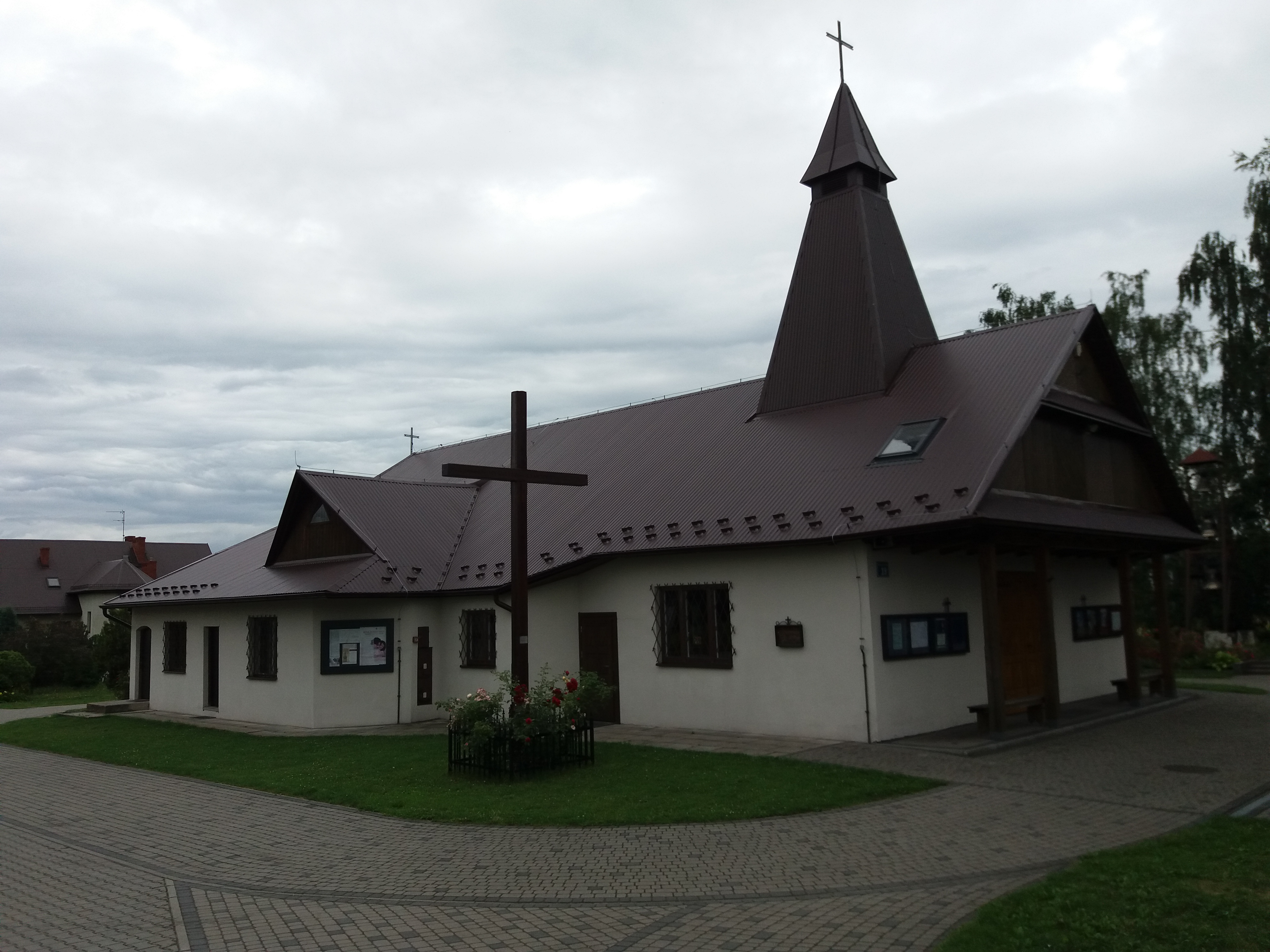 Kościół św. Maksymiliana Kolbe w Krakowie-Opatowicach